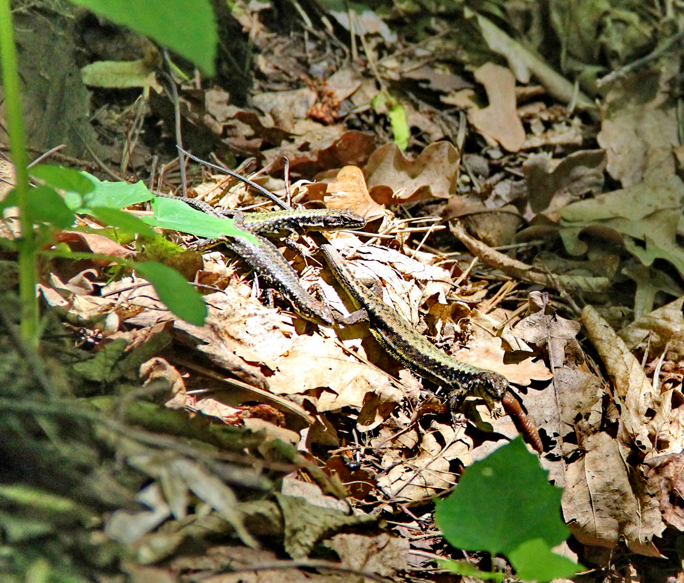 Я́щірка вірме́нська за сніданком